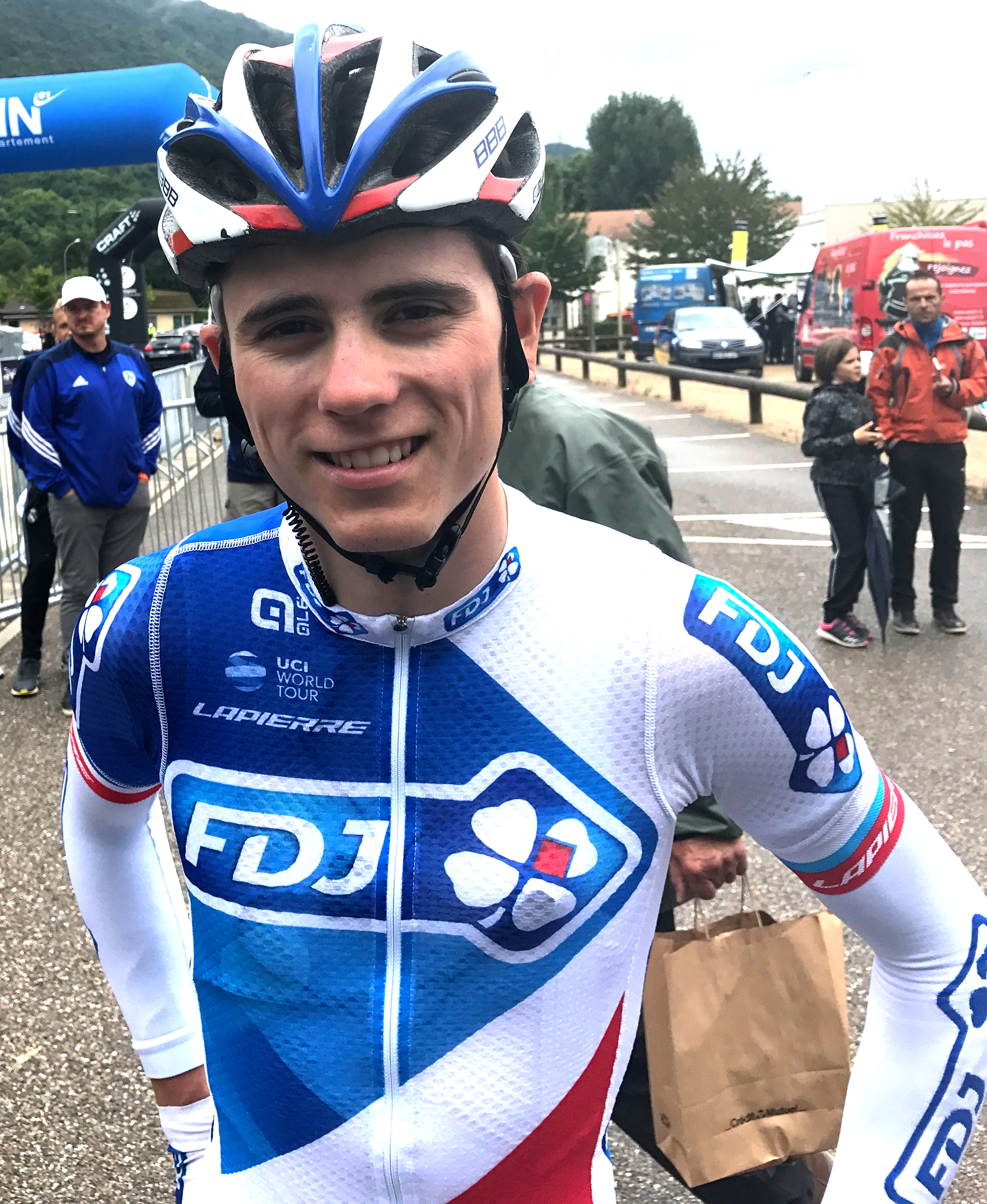 Tour de l'Ain 2017 - Stage 3 (Lagnieu).